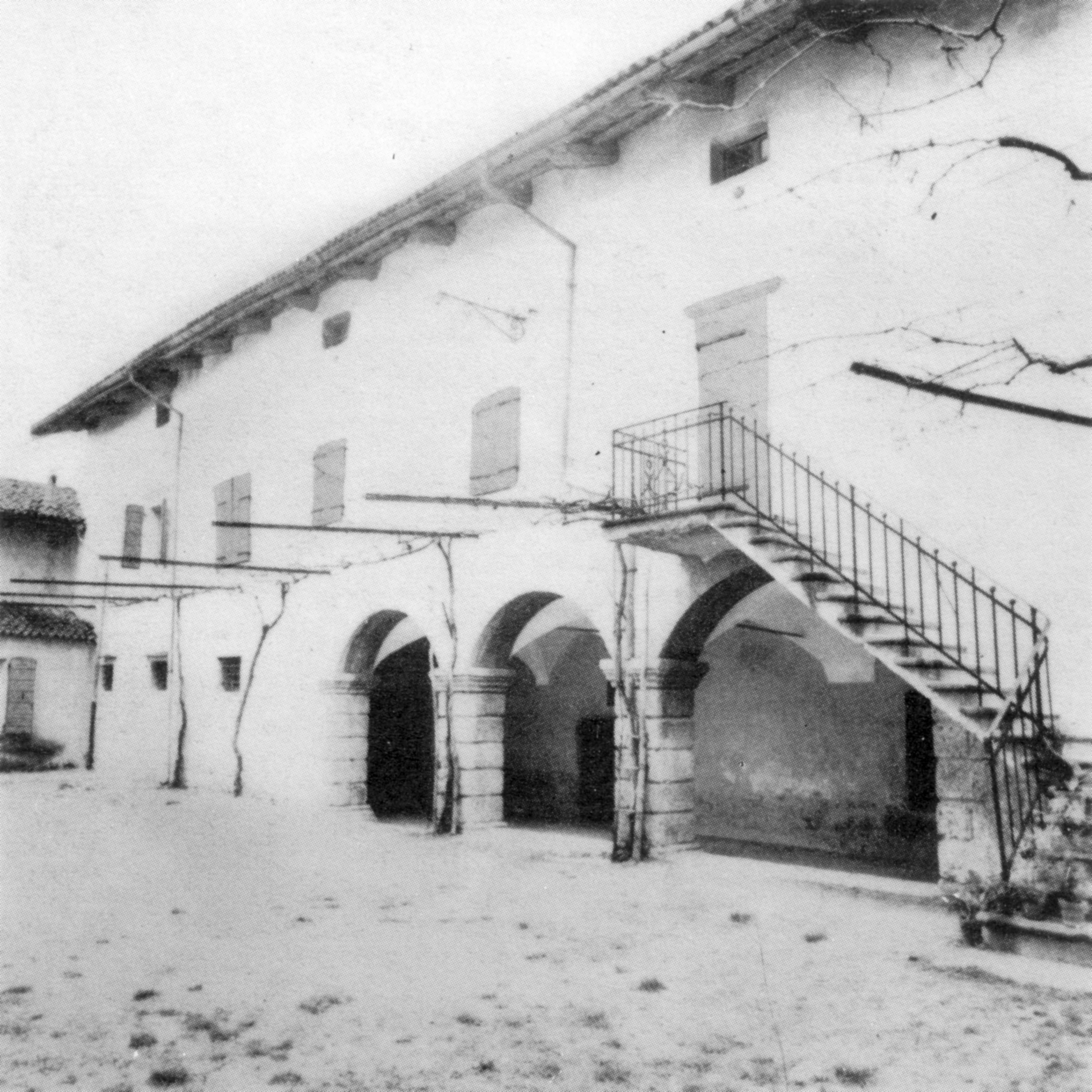 Ospedale di Santo Spirito di Ospedaletto prima del terremoto del 1976